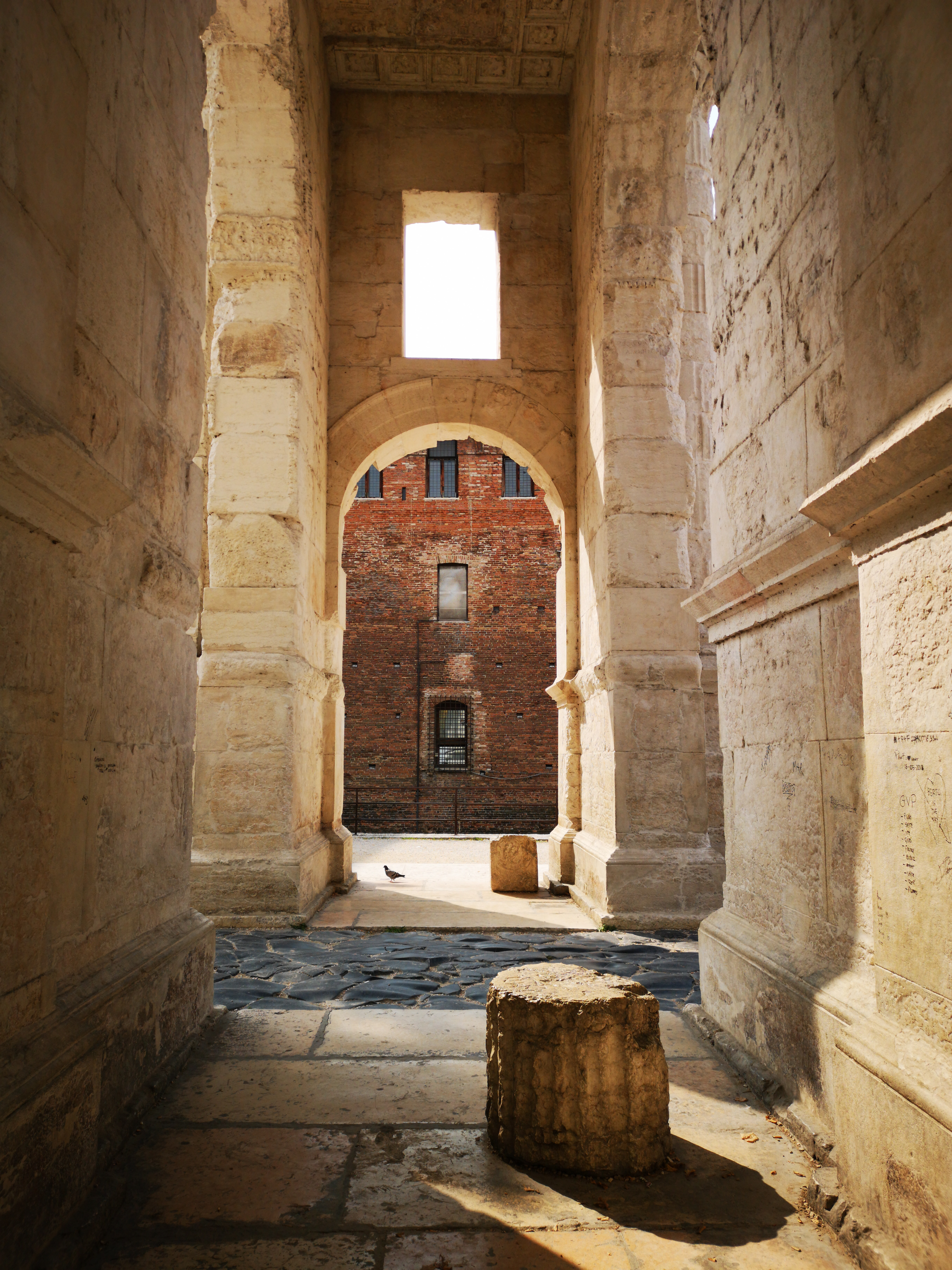 Arco dei Gavi This is a photo of a monument which is part of cultural heritage of Italy.